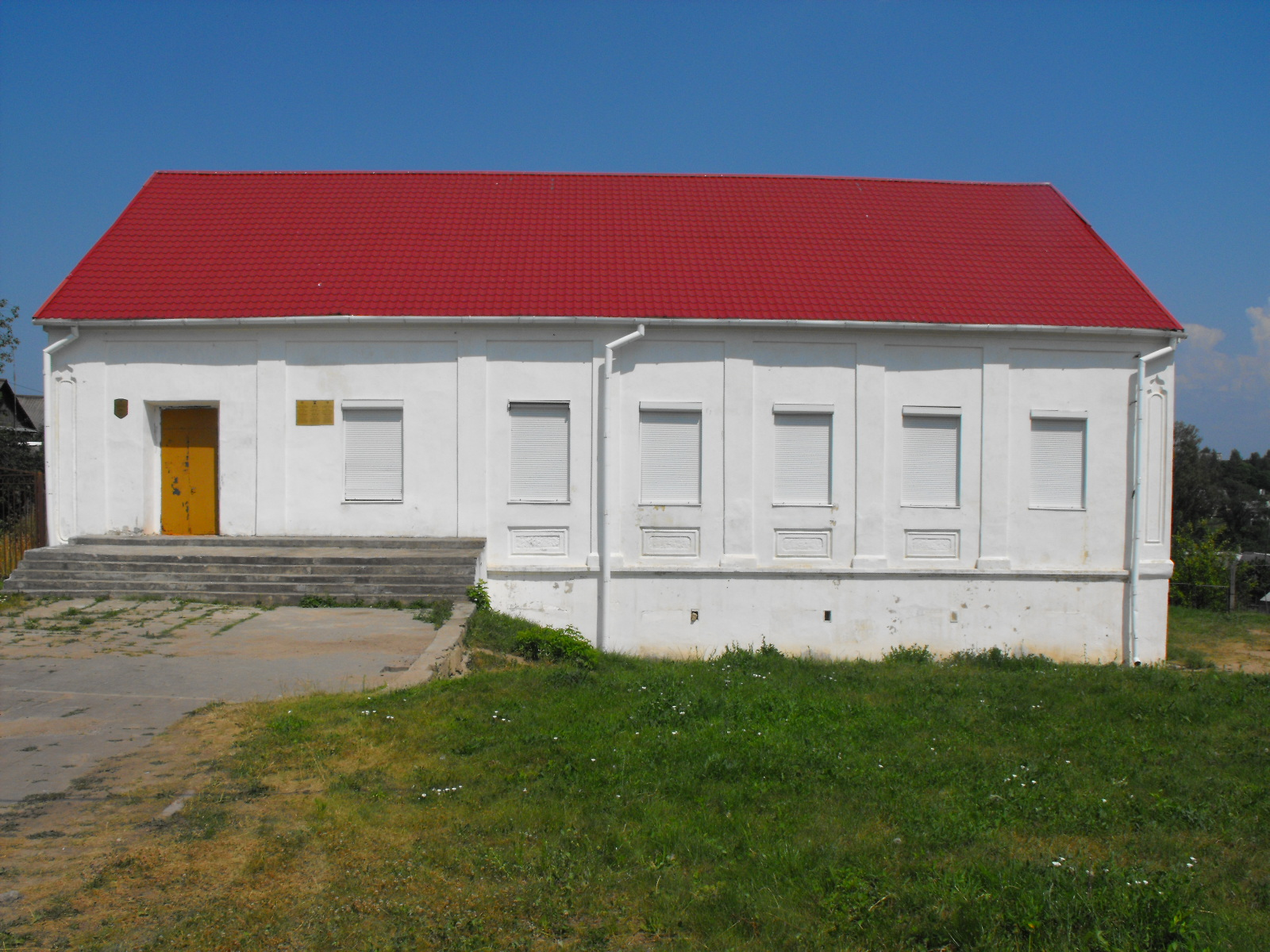 Здание Воложинской иешивы. Июль 2012 года